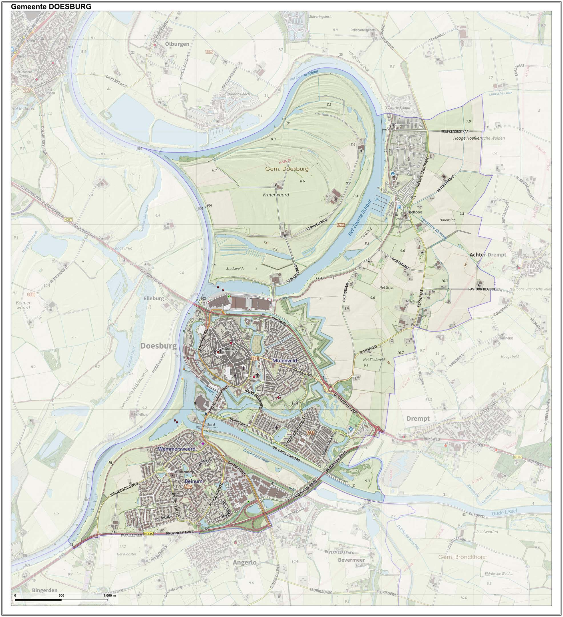 Topografische gemeentekaart. Resolutie: 400 pixels/km. Kaartbeeld samengesteld uit de open geodata van de Top10NL en Top25namen (Kadaster), Creative Commons-BY licentie. Gebouwvlakken uit open geodata BAG extract. Wegen uit de OpenStreetMap, OpenStreetMap community. Reliëfschaduw uit de Actuele Hoogtekaart AHN2. Samenstelling en kleurenschema: Jan-Willem van Aalst, met QGIS. Zie ook de Legenda.